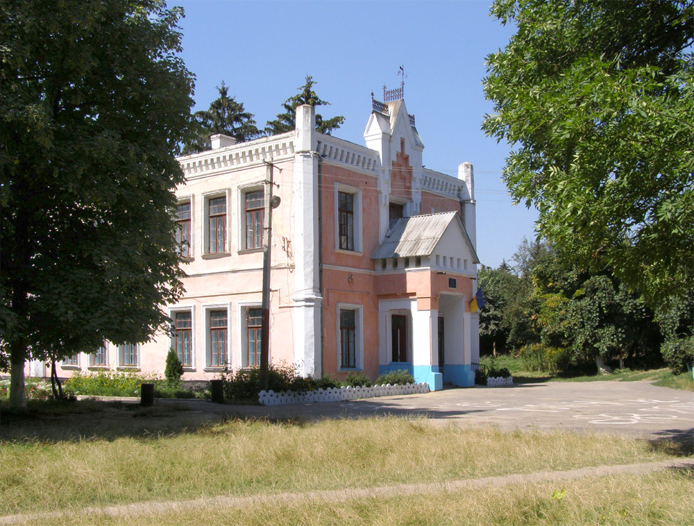 Kapuściany, Ukraina - fragment pałacu zbudowanego przez Ignacego Szczeniowskiego